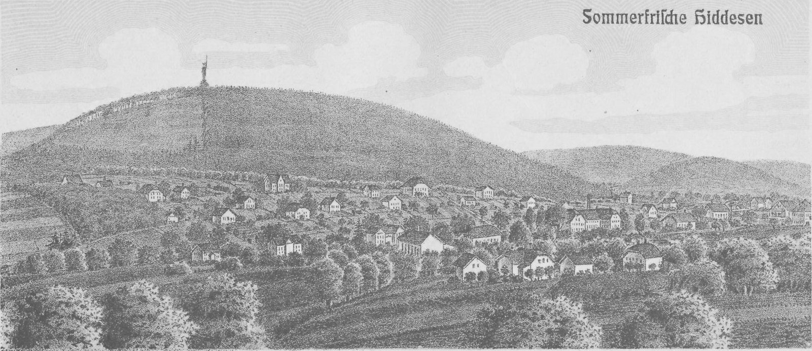 Hiddesen um 1904